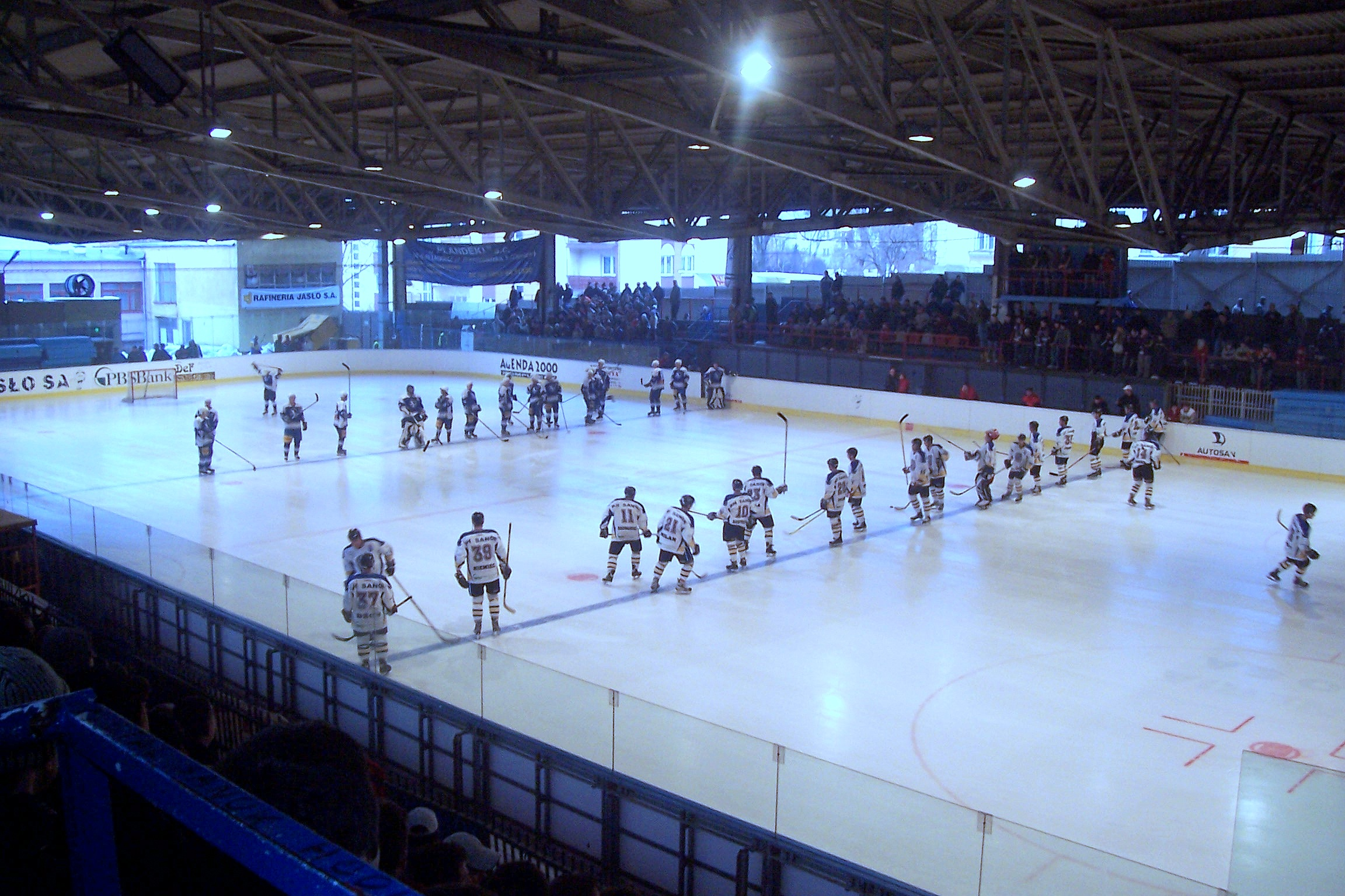 Ostatni mecz na lodowisku Torsan w Sanoku: KH Sanok - Stoczniowiec Gdańsk 21.03.2006